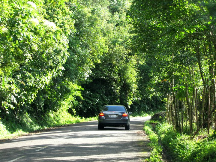 Parque nacional Chorro El Indio al este de San Cristóbal (Venezuela) 2006